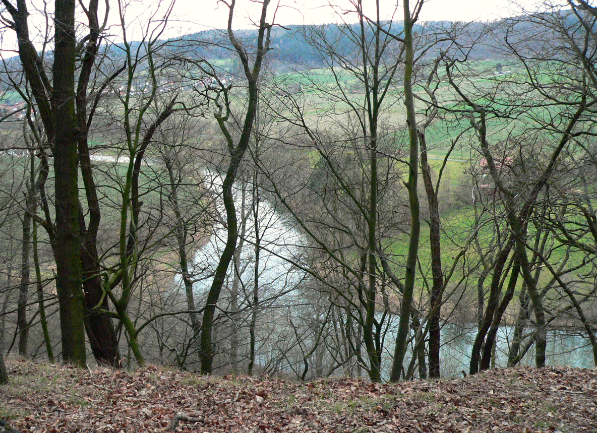 Weserschleife unterhalb des Burgbergs mit dem Römerlager Hedemünden